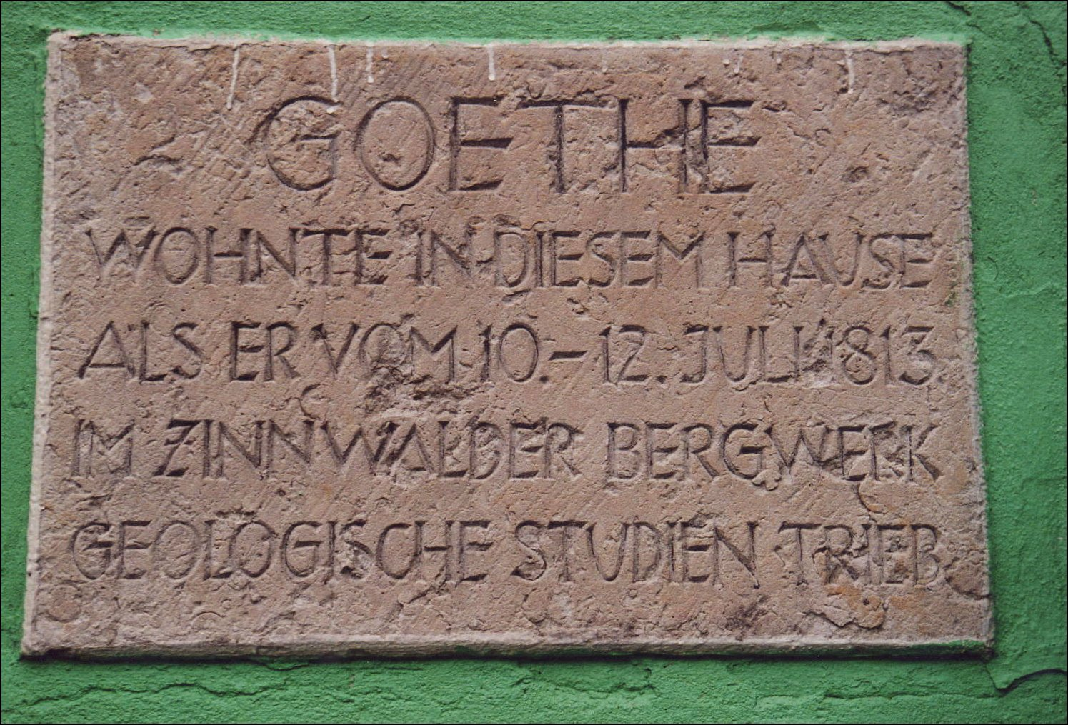 Zinnwald-Georgenfeld: Hotel "Sächsischer Reiter" - Inschriftenplatte zur Erinnerung an den Besuch Goethes am 10./12. Juli 1813